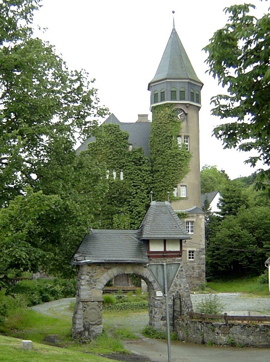 Schloss Wildenberg (Olsberg-Brunskappel), Germany.